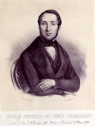 Vincenzo Fracanzani (1800-1860), fondatore del Museo Civico Lapidario di Este (Padova) divenuto in seguito Museo nazionale atestino